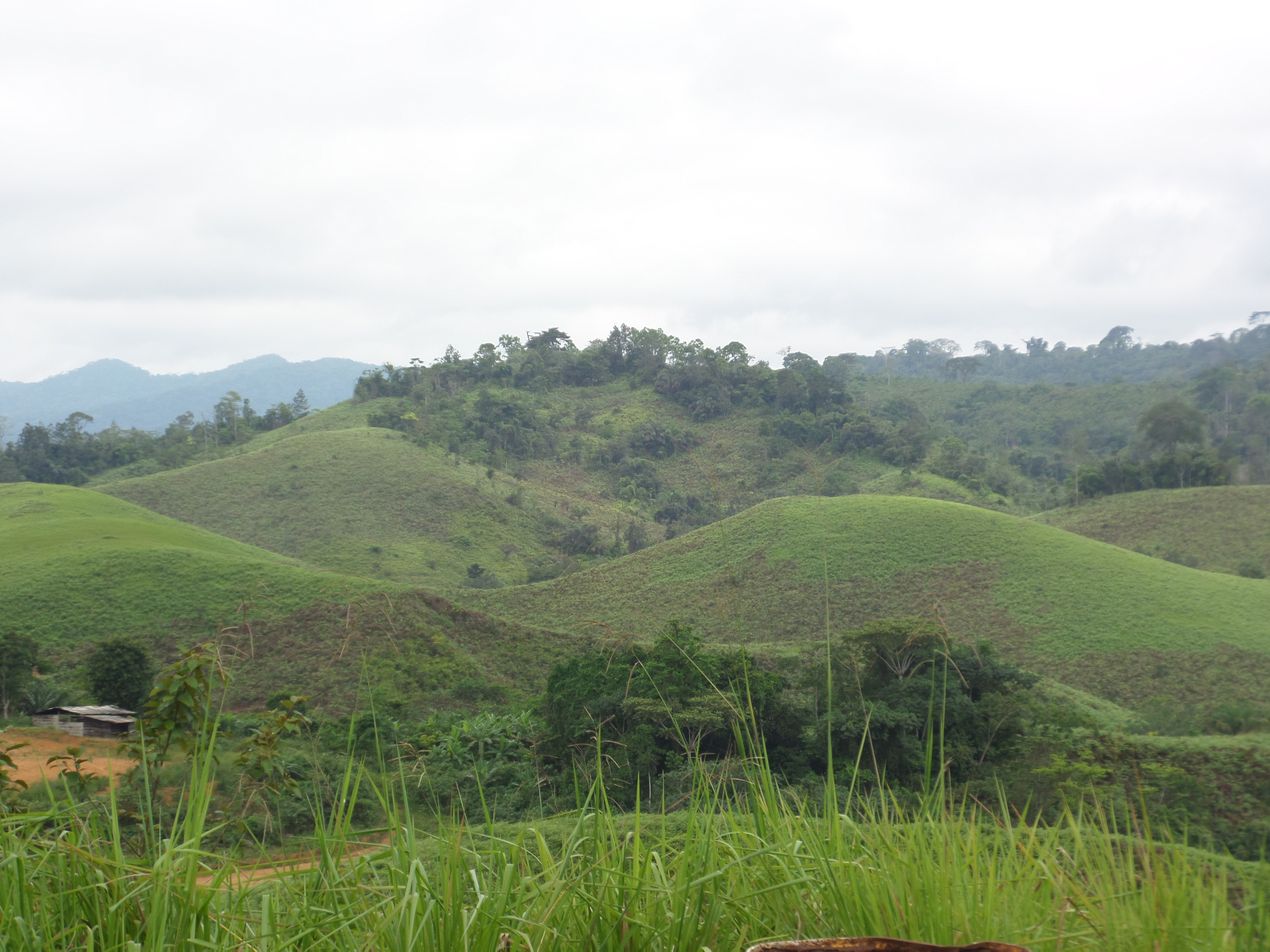 Beauté des collines de la ville de mimongo